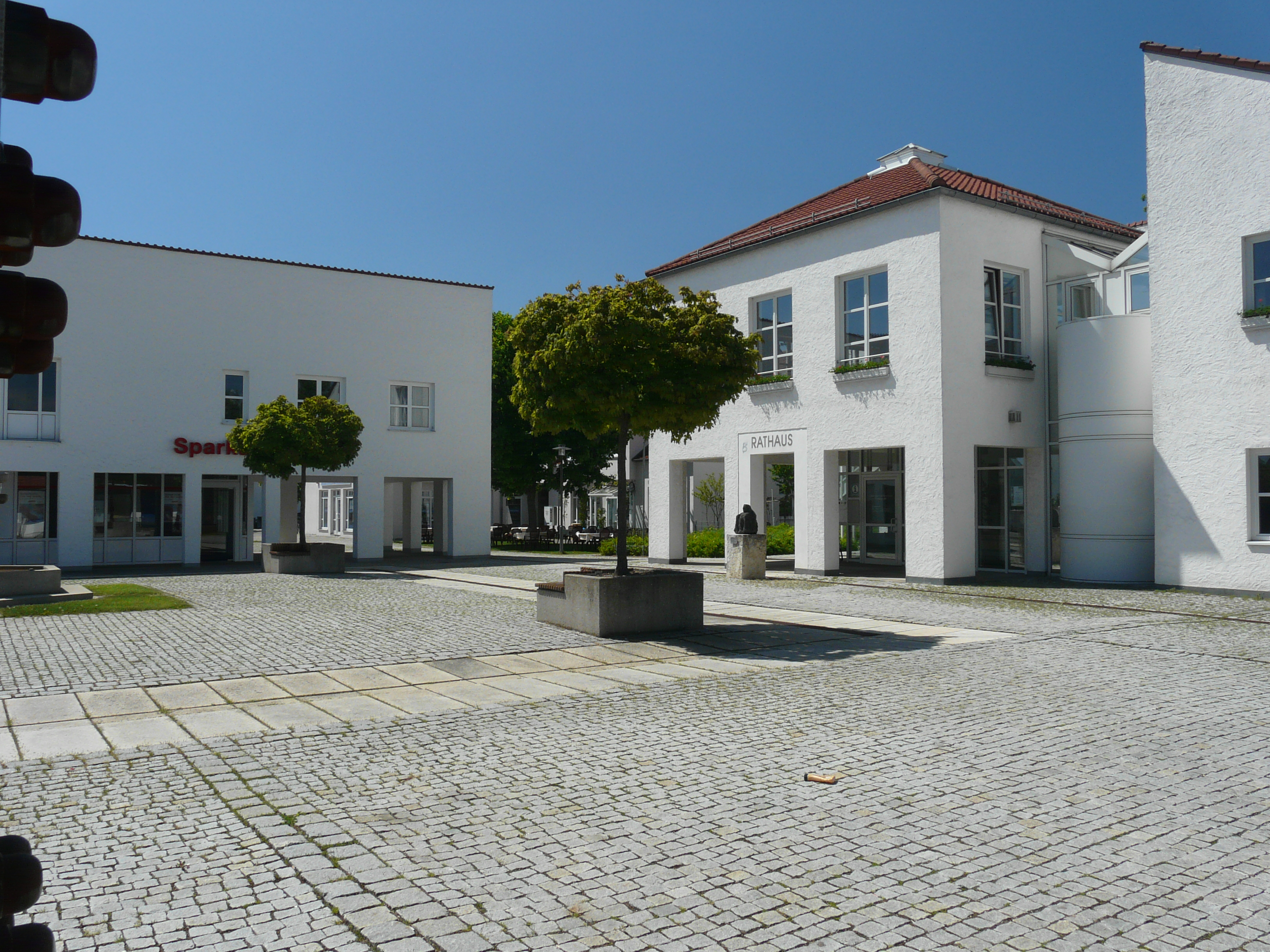 Rathaus von Mühlhausen in der Oberpfalz